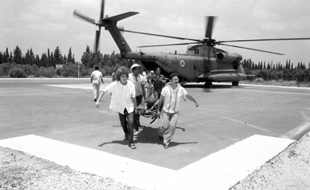 פינוי פצועים במלחמת לבנון הראשונה. במנחת המרכז הרפואי רמב"ם בחיפה.